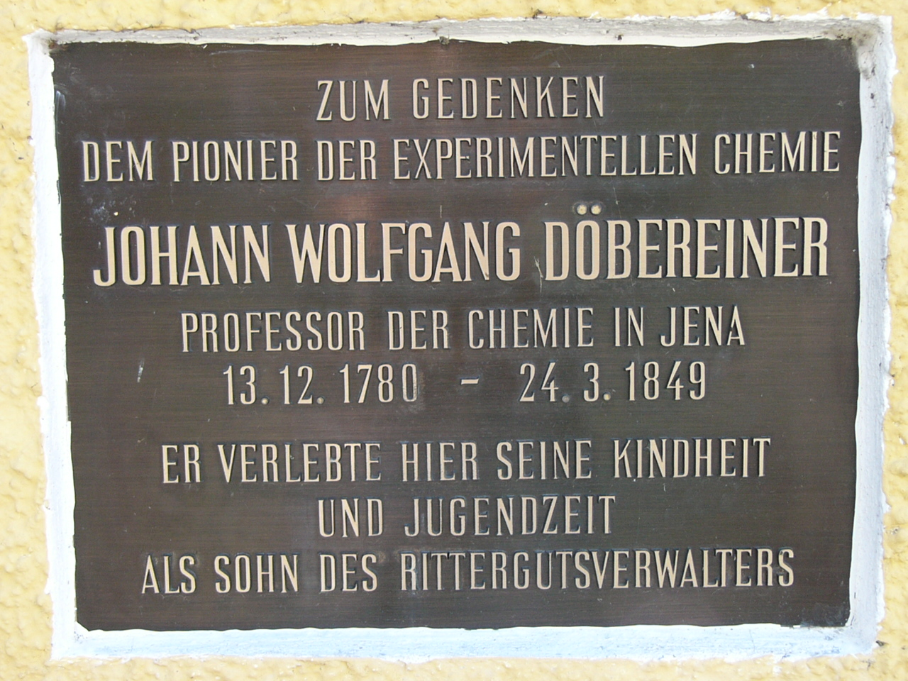 Gedenktafel zu Döbereiner am Eingang des Rittergutes Bug